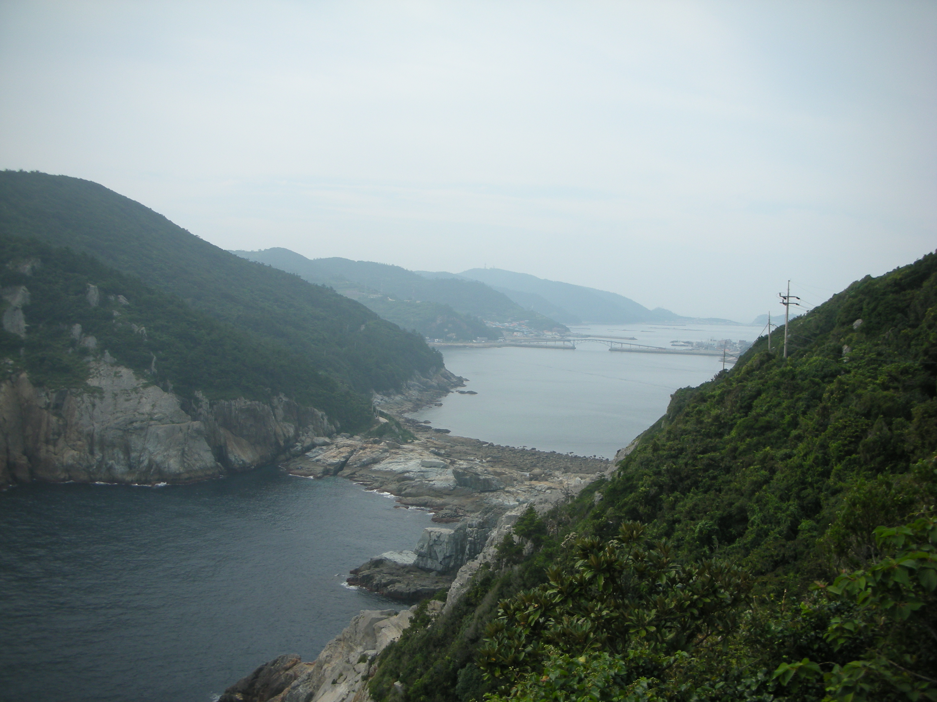 Geomundo 3